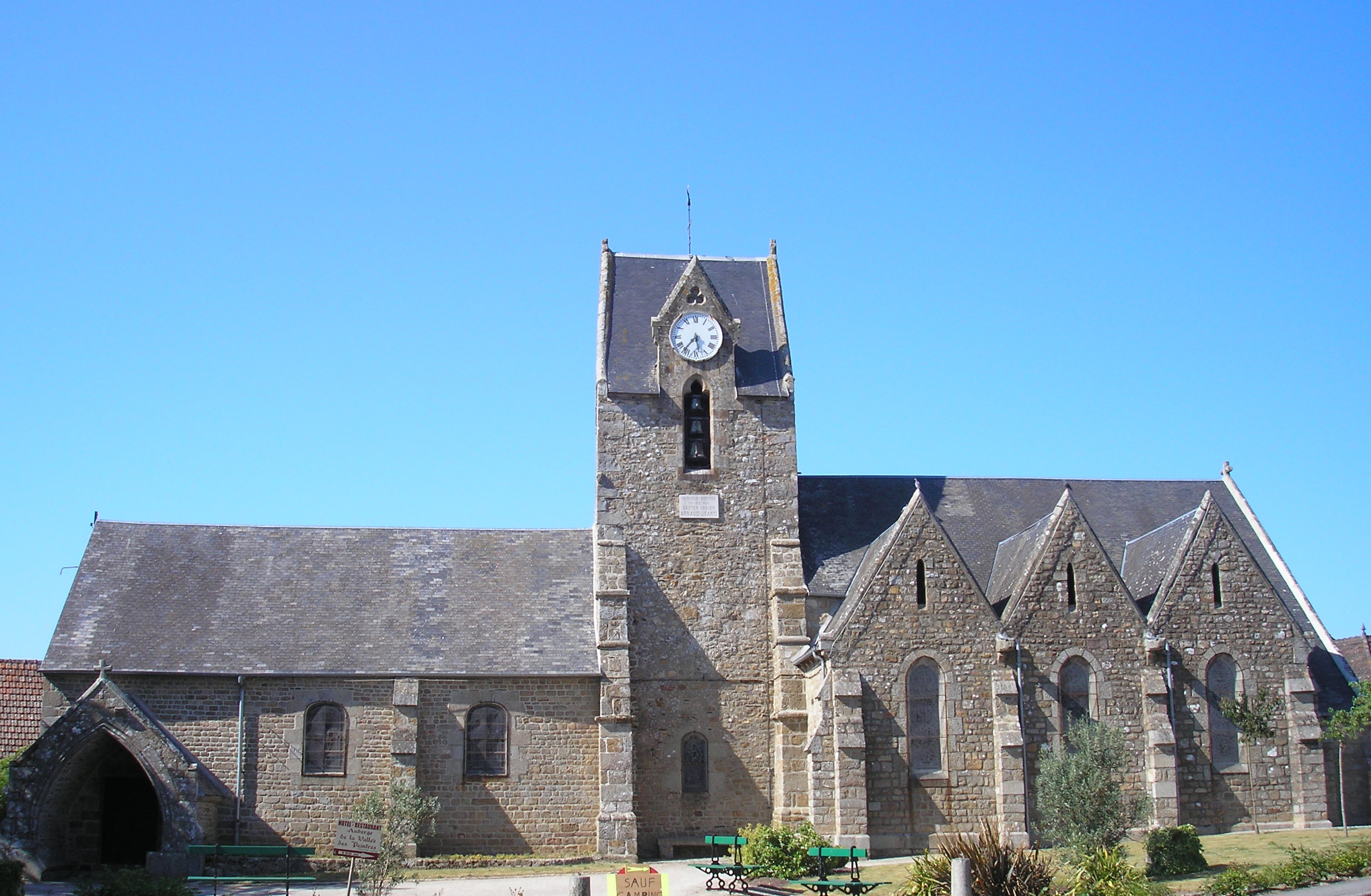 Carolles (Normandie, France). L'église Saint-Vigor.